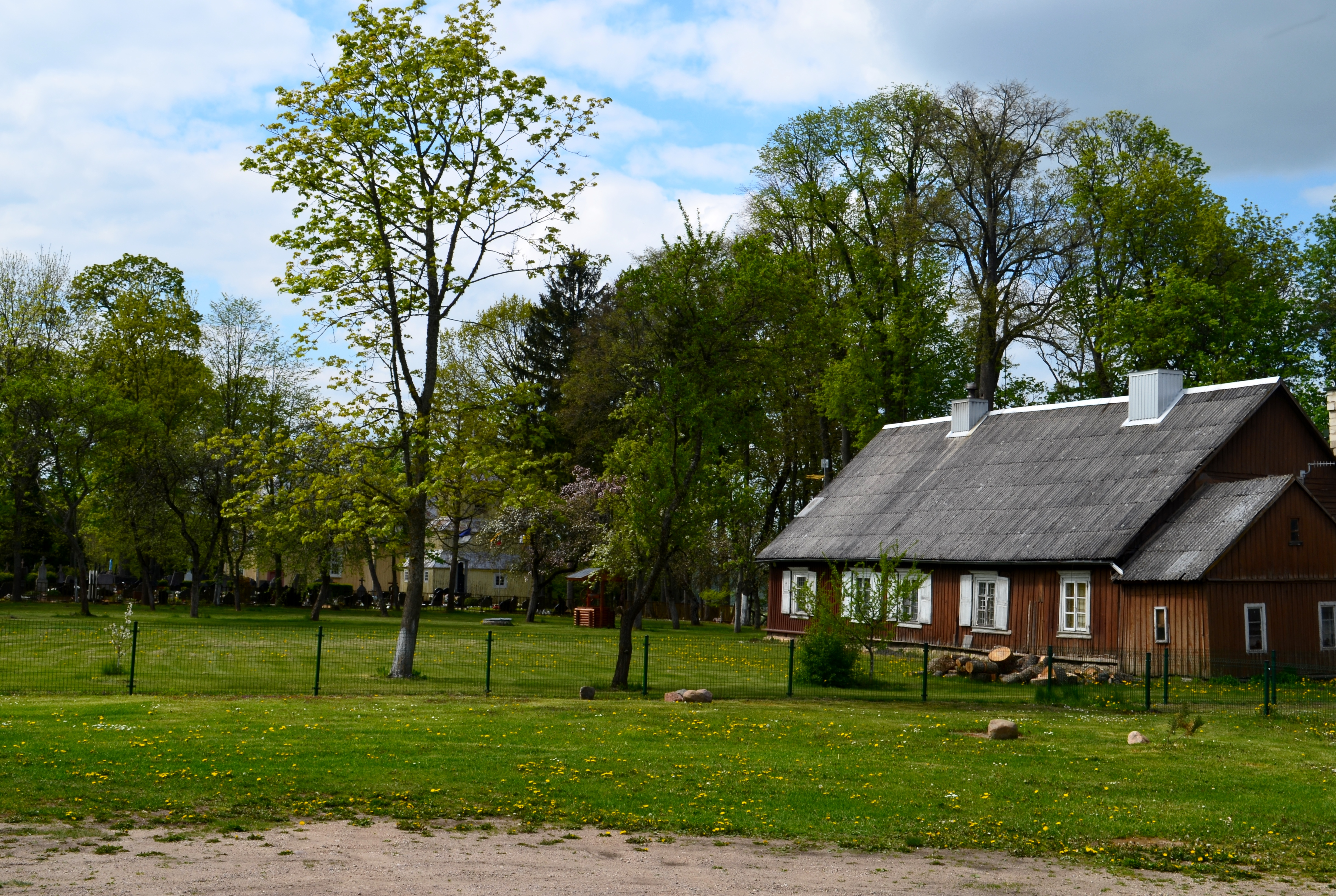 Ilguvos klebonija, Šakių raj.